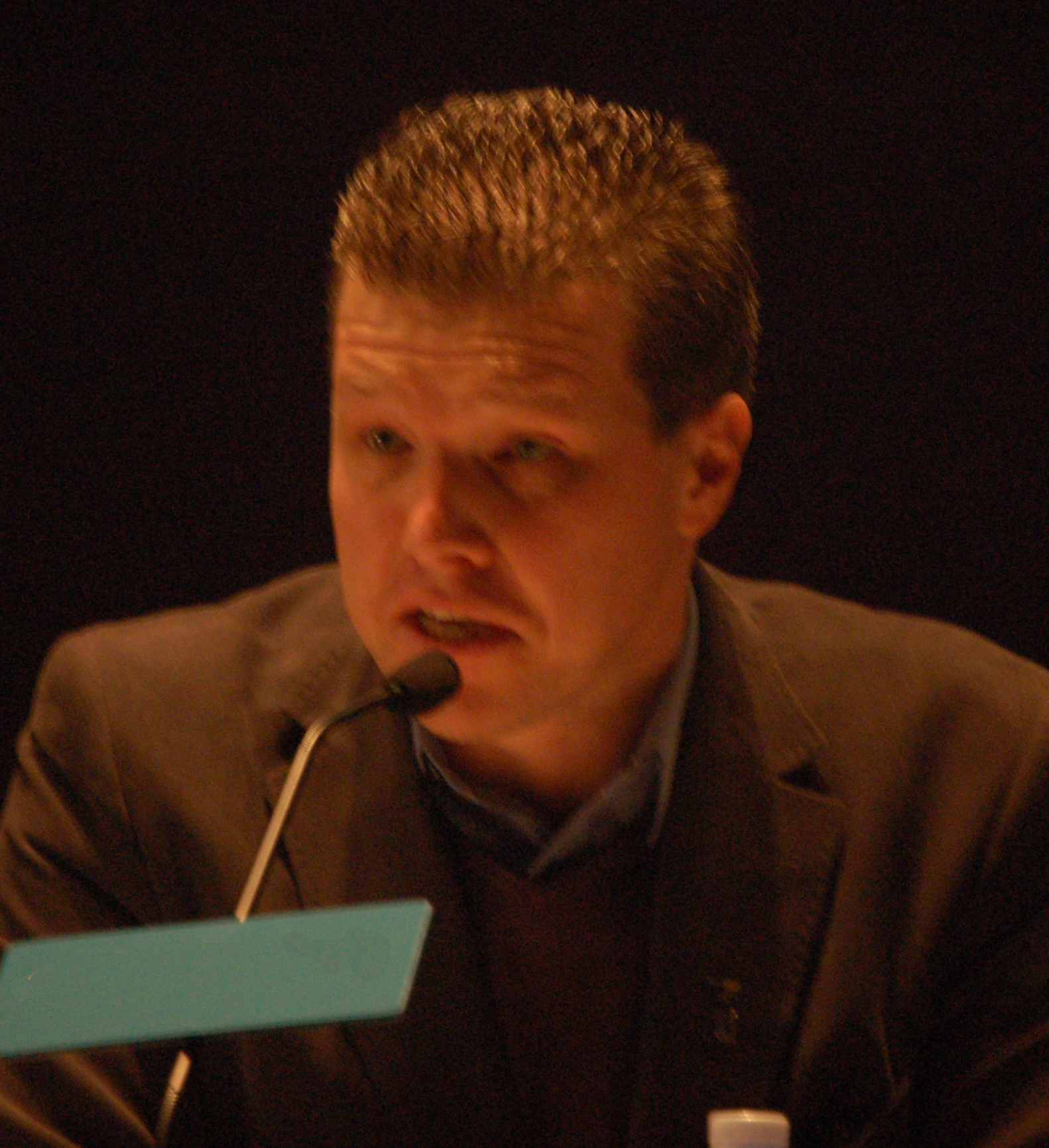 Craig Patterson no I Simposio Ecolingua